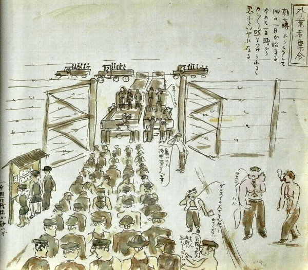 第１２労働キャンプの生活